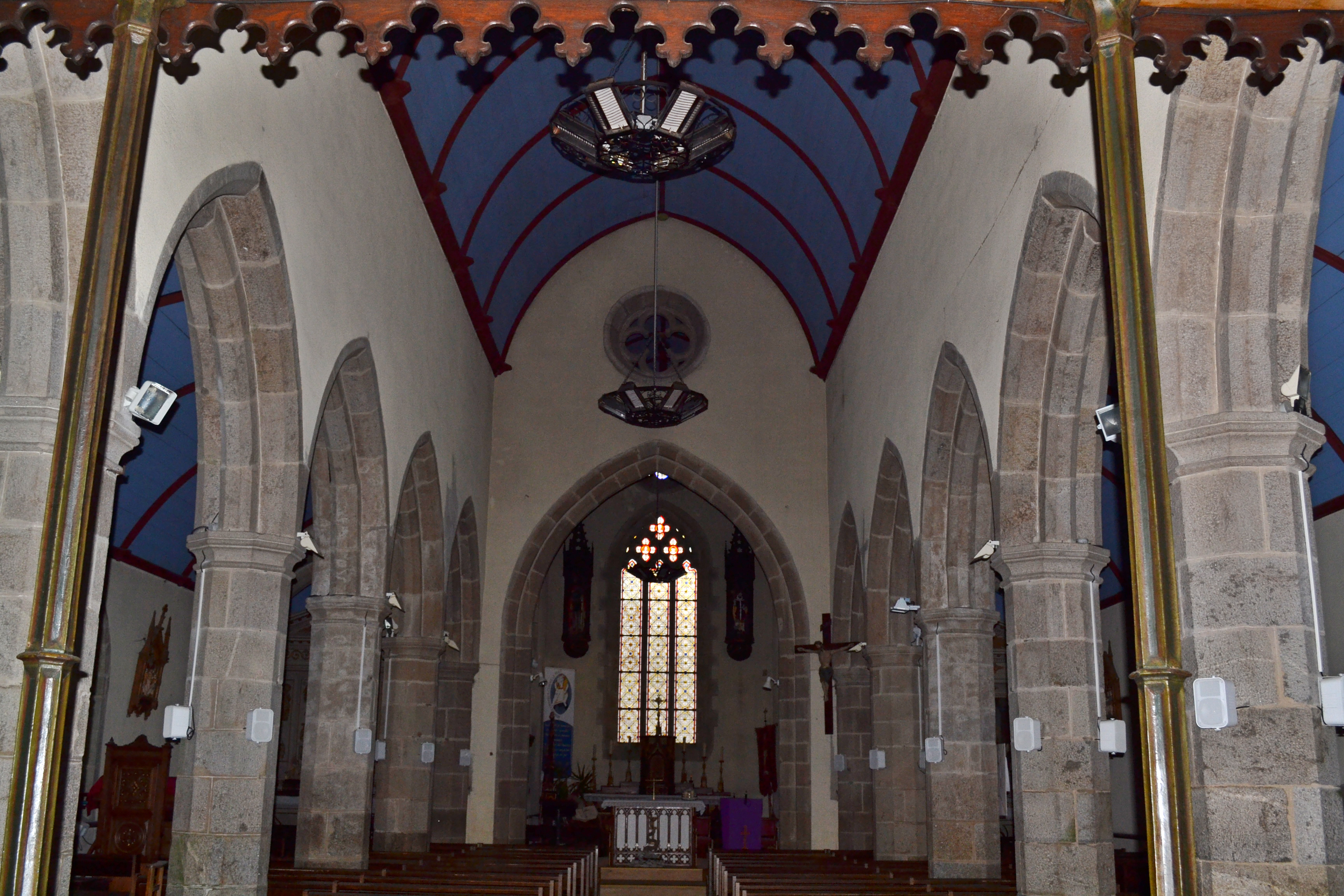 Eglise Saint-Adrien à Santec (Finistère, Bretagne).